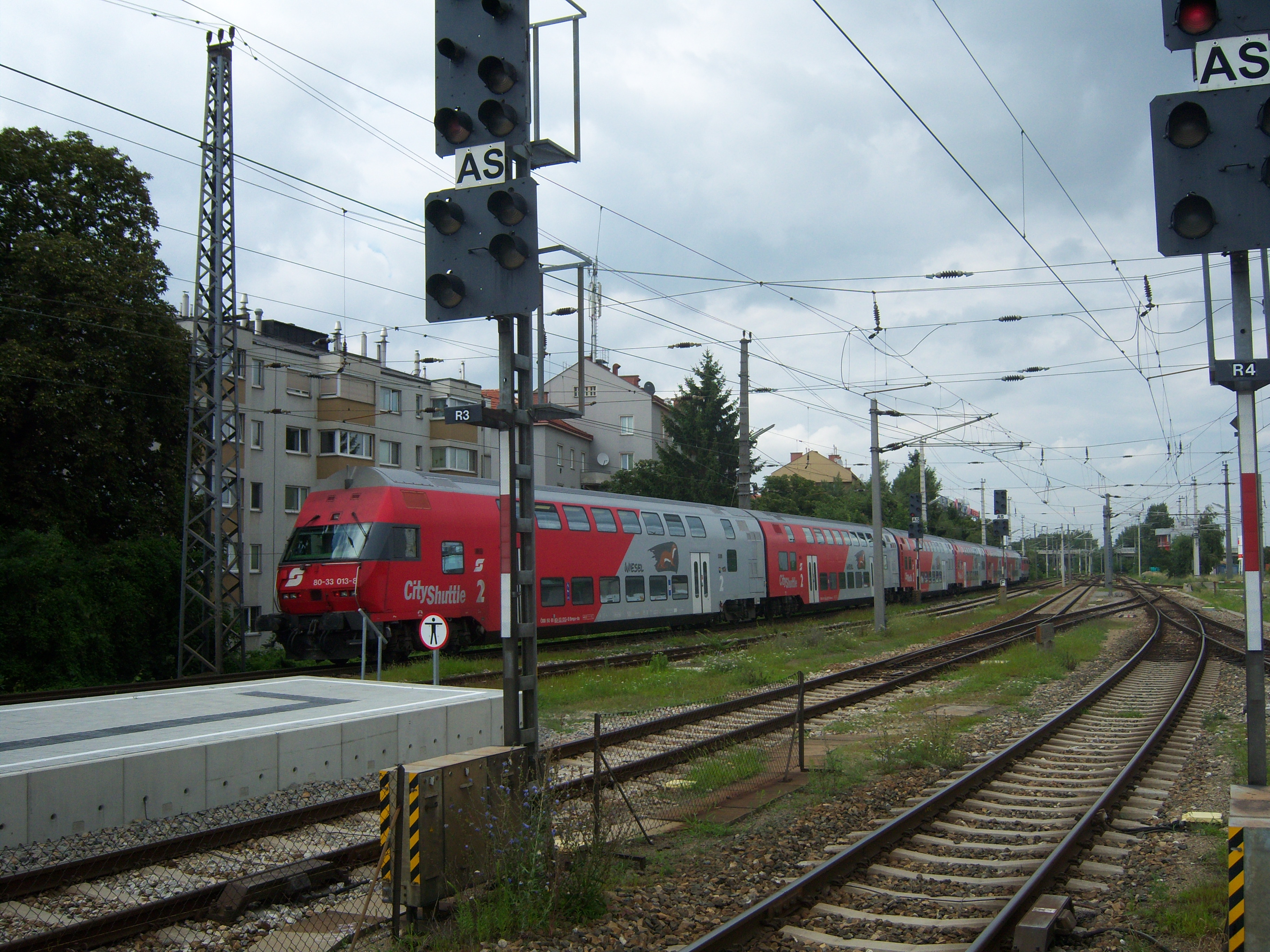 Wieselzug in Heiligenstadt